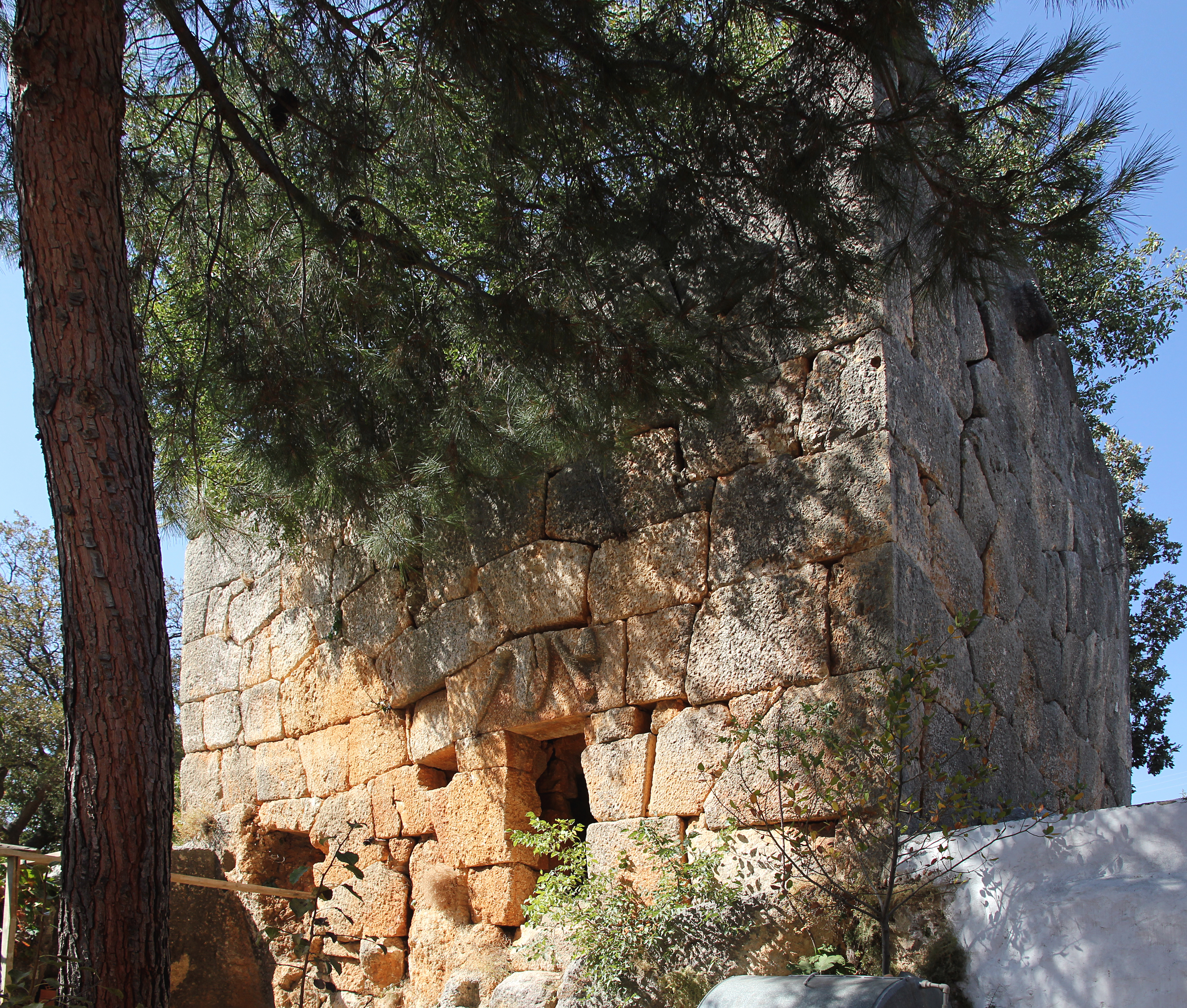 Kilikischer Turm von Hançerli bei Kızkalesi in der Südtürkei, auf dem Tüsturz vier Olbische Zeichen